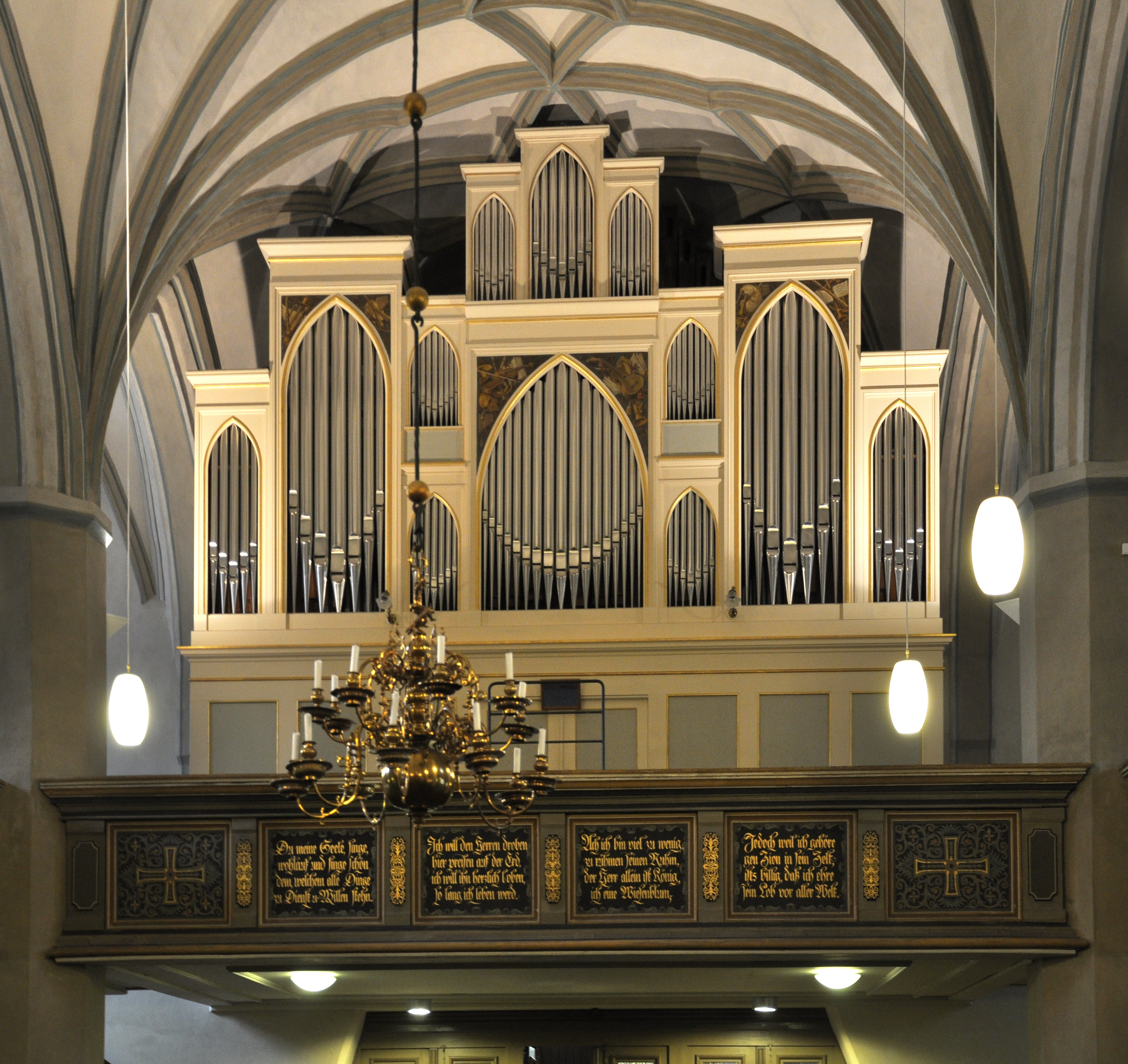 Lübben, Paul-Gerhardt-Kirche, Schuke-Orgel von 1906